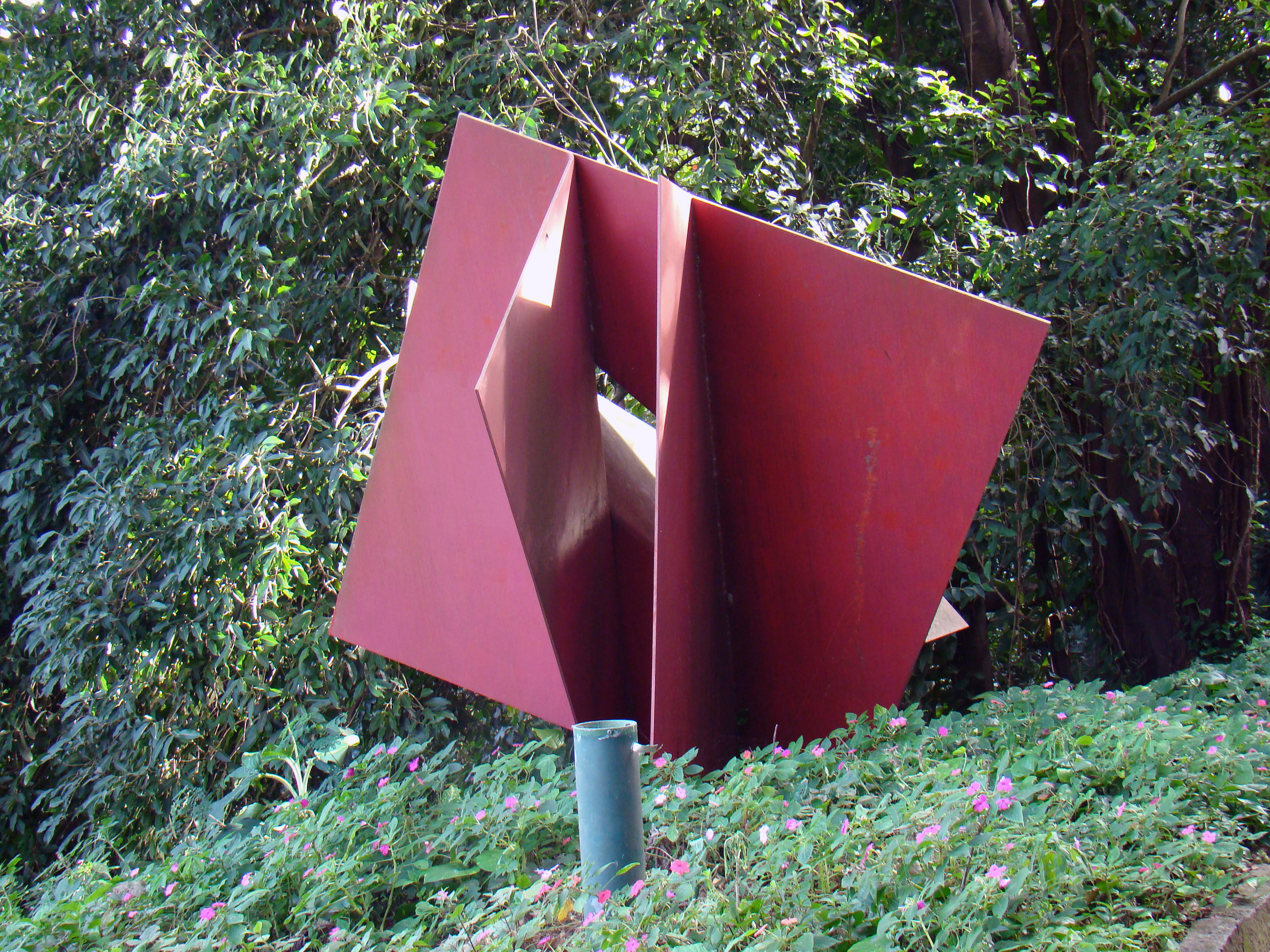 Sculpture by Franz Weissmann in Parque da Catacumba in Rio de Janeiro/Brazil No alto do mirante, uma visão sempre surpreendente da Lagoa e do mar! Vale o esforço!